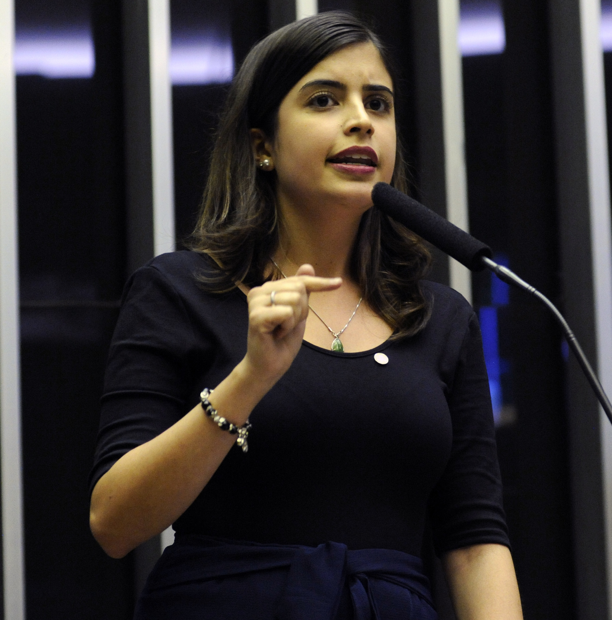 Tabata Amaral em março de 2019.